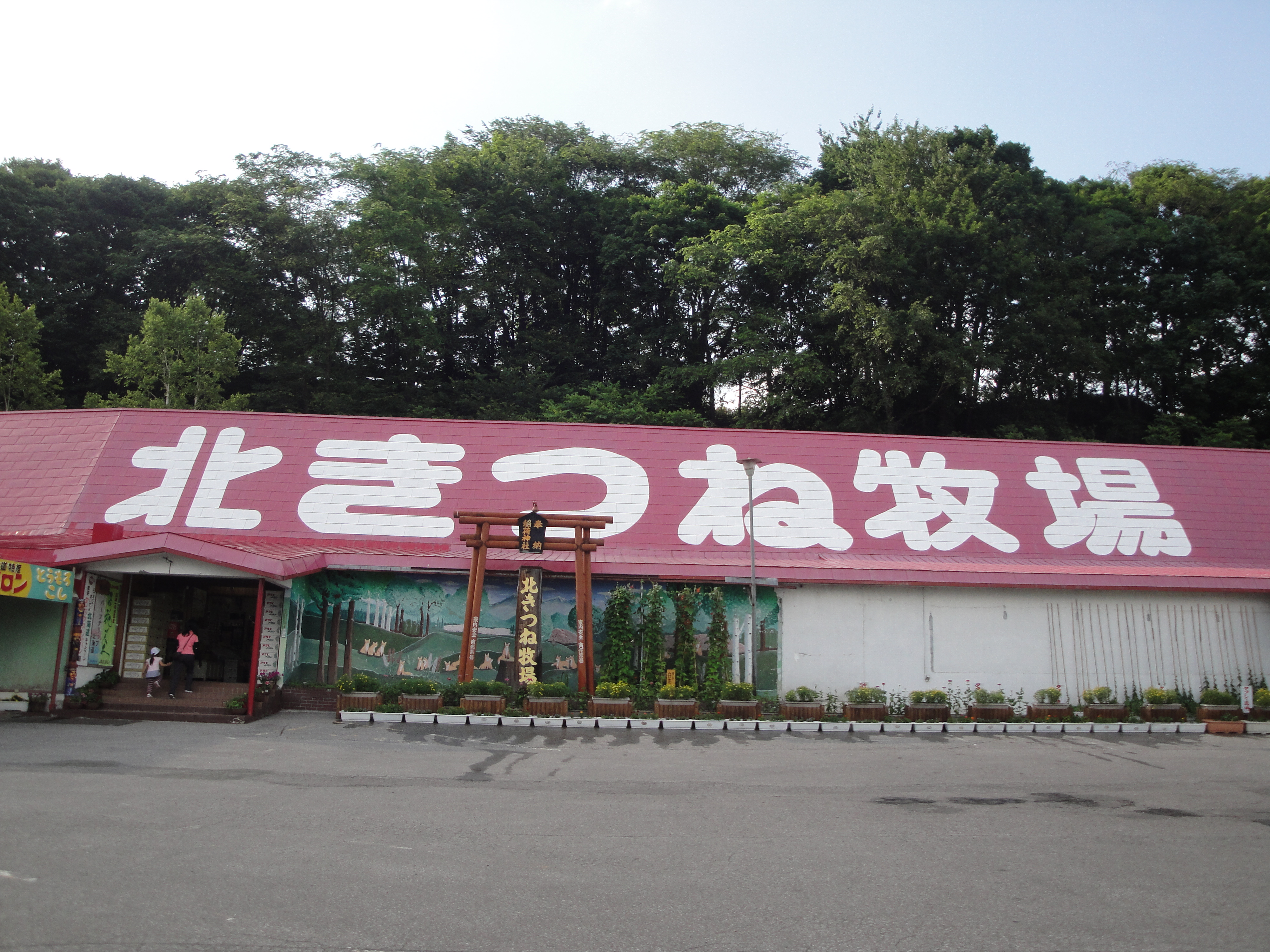 北きつね牧場。留辺蘂（るべしべ）、温根湯（おんね湯）温泉。北海道北見市。